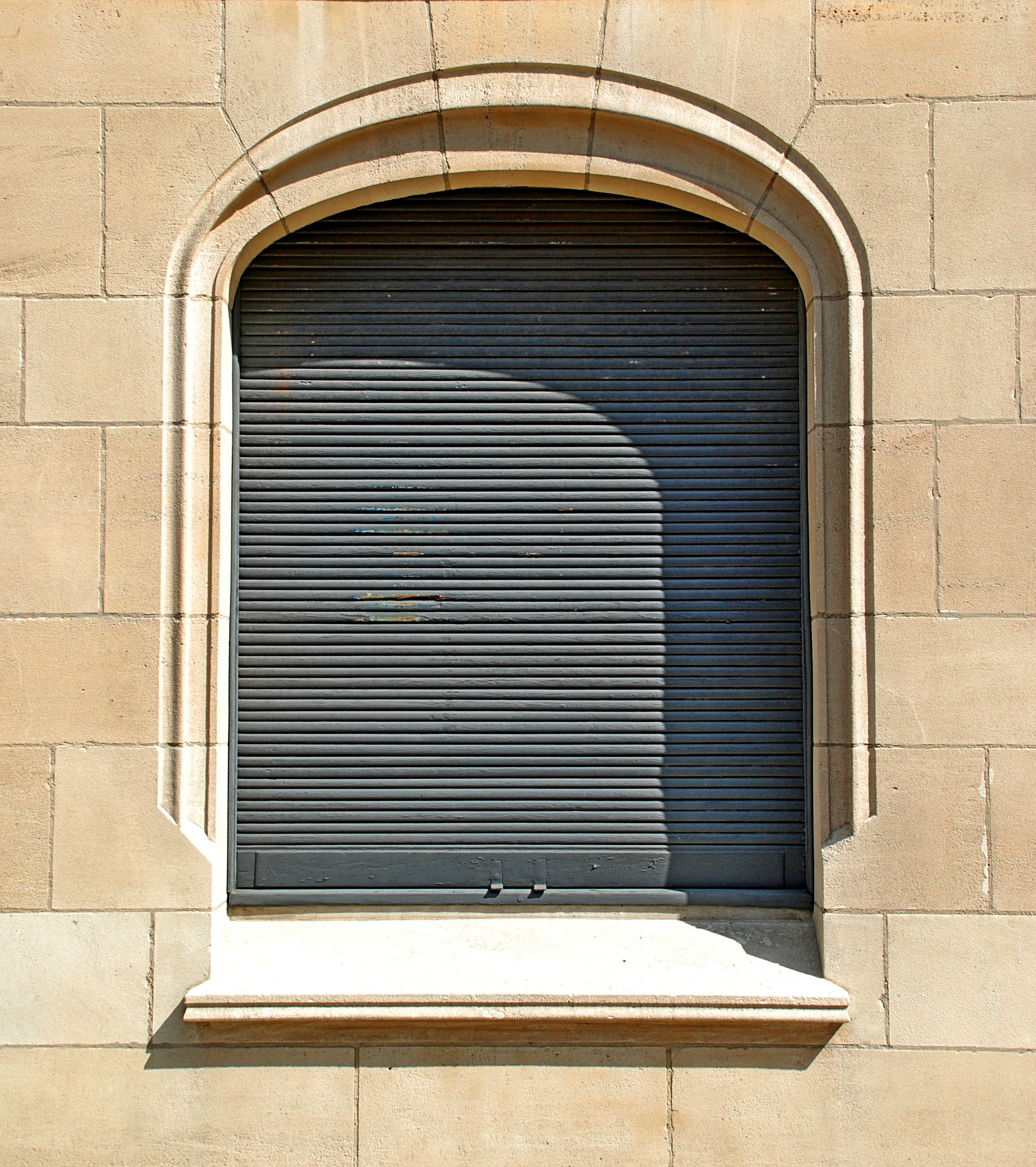 Belgique - Bruxelles - Hôtel De Brouckère